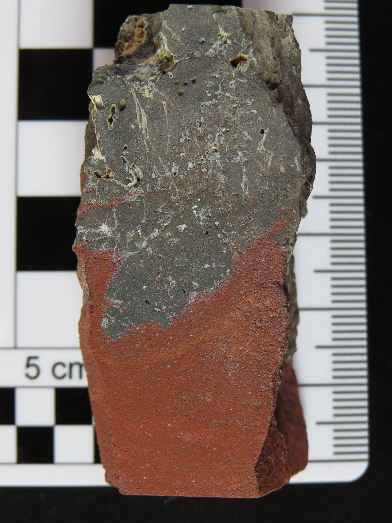 Gefrittetes Gestein in direktem Kontakt mit Tholeiitbasalt. Westfjorde, Island